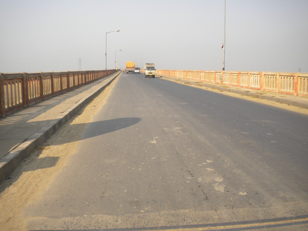 KALYANI SETU